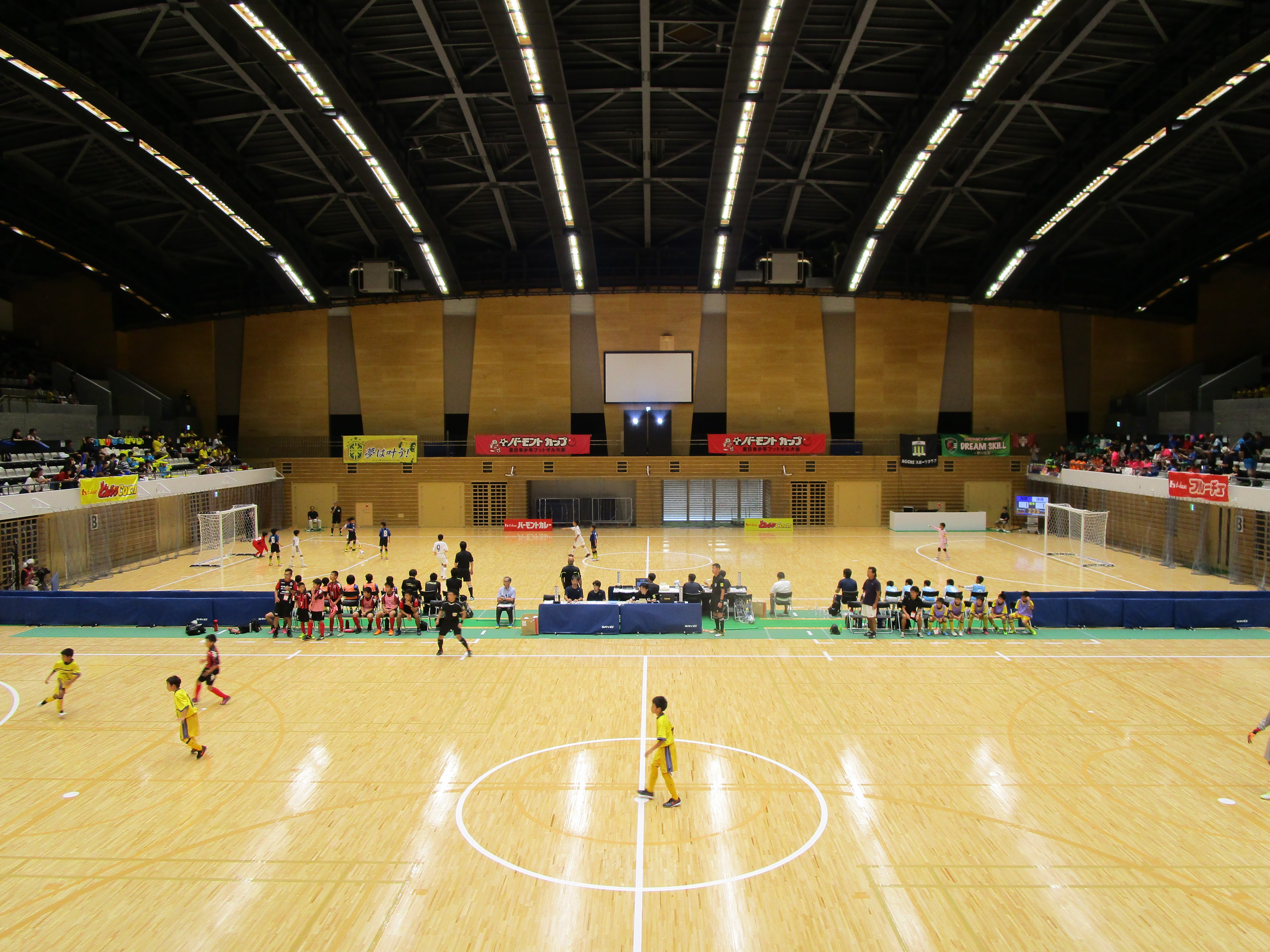 新駒沢オリンピック公園総合運動場屋内球技場のアリーナ